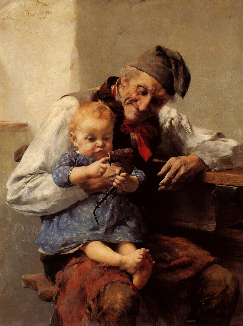 "The Favorite" - Grandfather and Grandson - "Ο Αγαπημένος του Παππού"